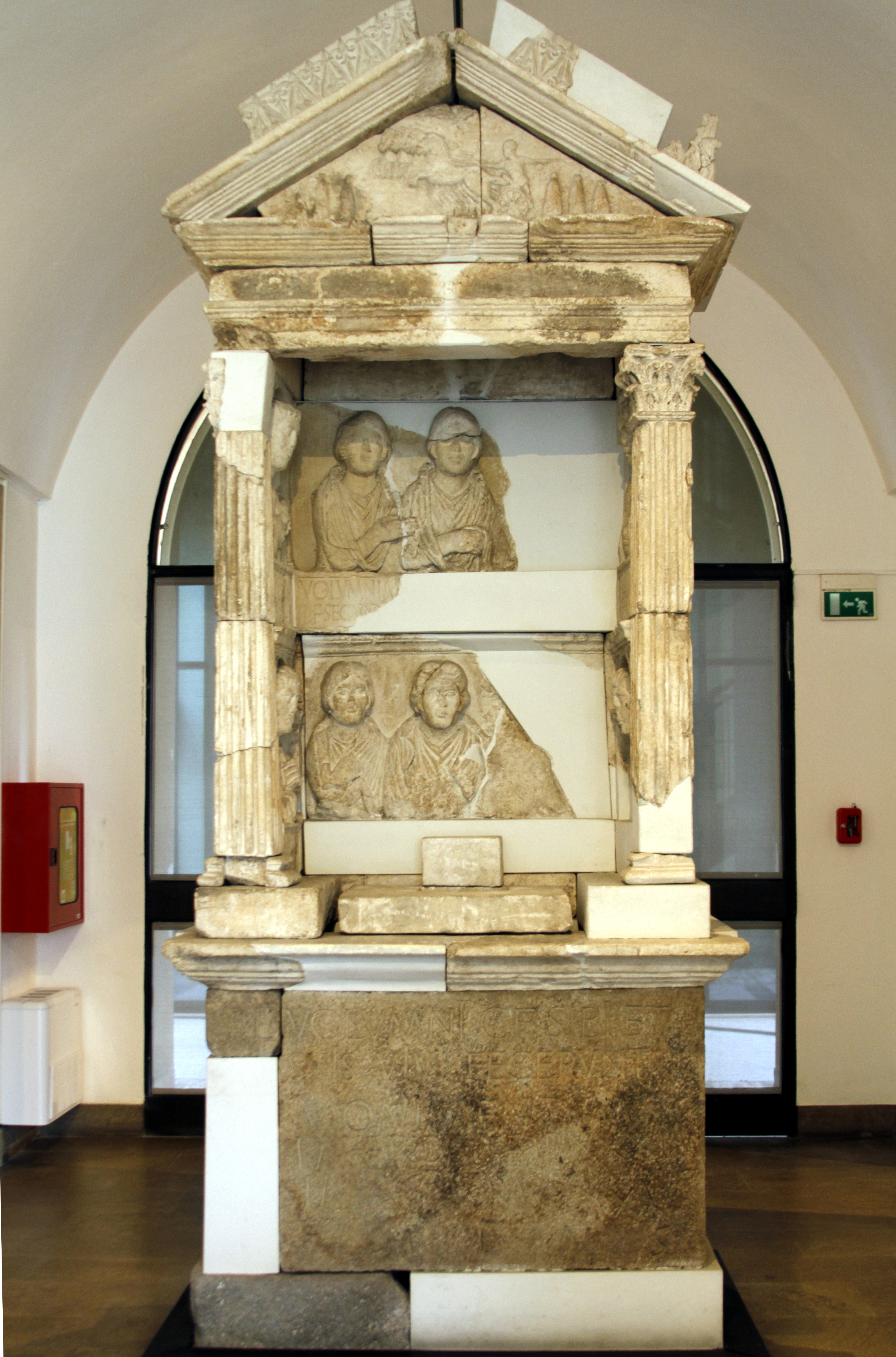 Musei Civici Eremitani - Padua